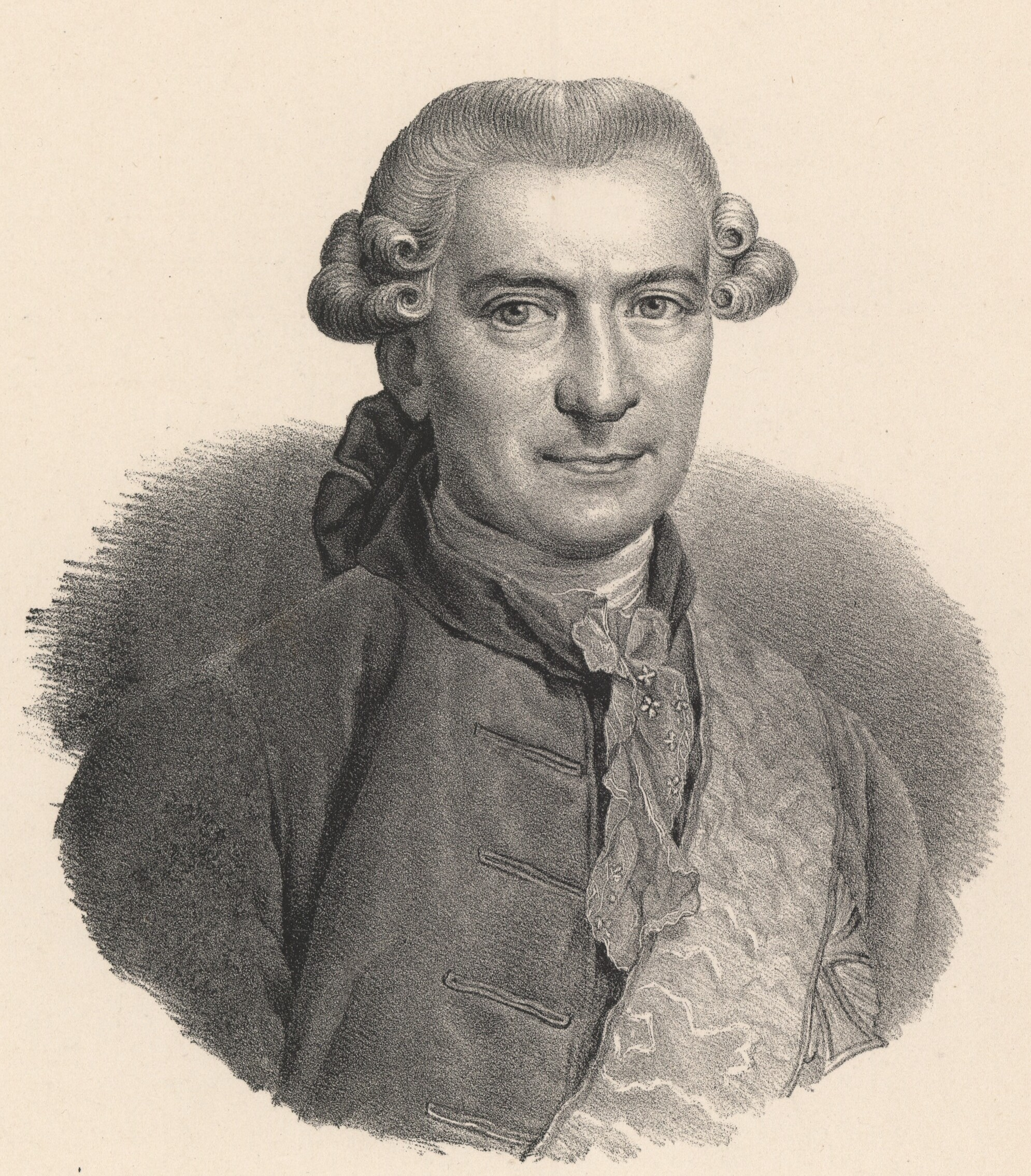 Lithographie eines Porträts des dänischen Ministers Ove Høegh-Guldberg (1731-1808) von Emil Bærentzen, basierend auf einem Kupferstich von J.Fr. Clemens, der wiederum auf dem Porträt von Jens Juel beruht